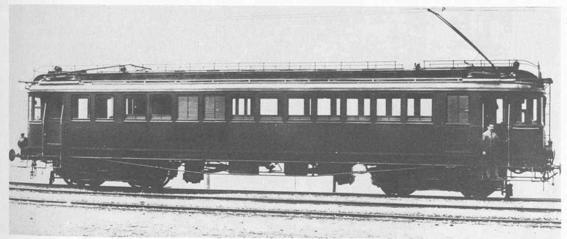 Automotrice elettrica trifase gruppo 30 della Rete Adriatica, in prova sulla linea Colico-Sondrio.